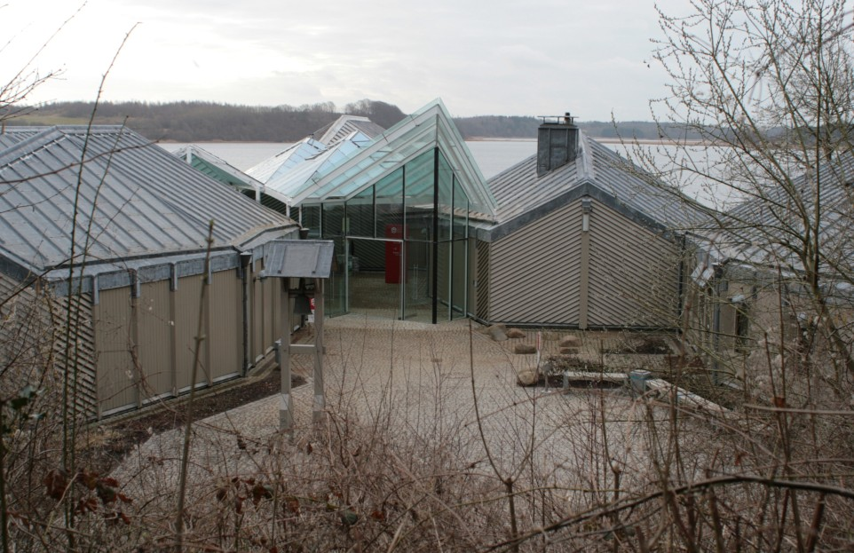 Neuer Eingangsbereich Wikinger Museum Haithabu